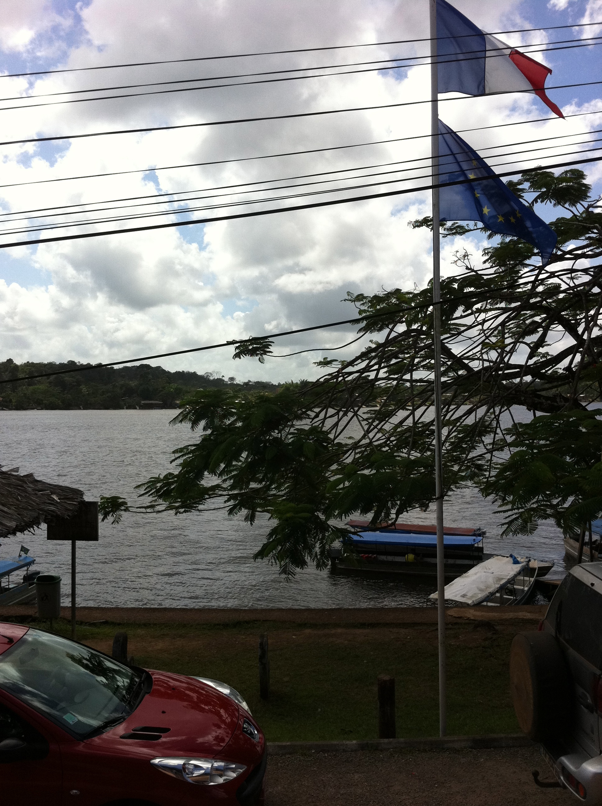 novembre 2011